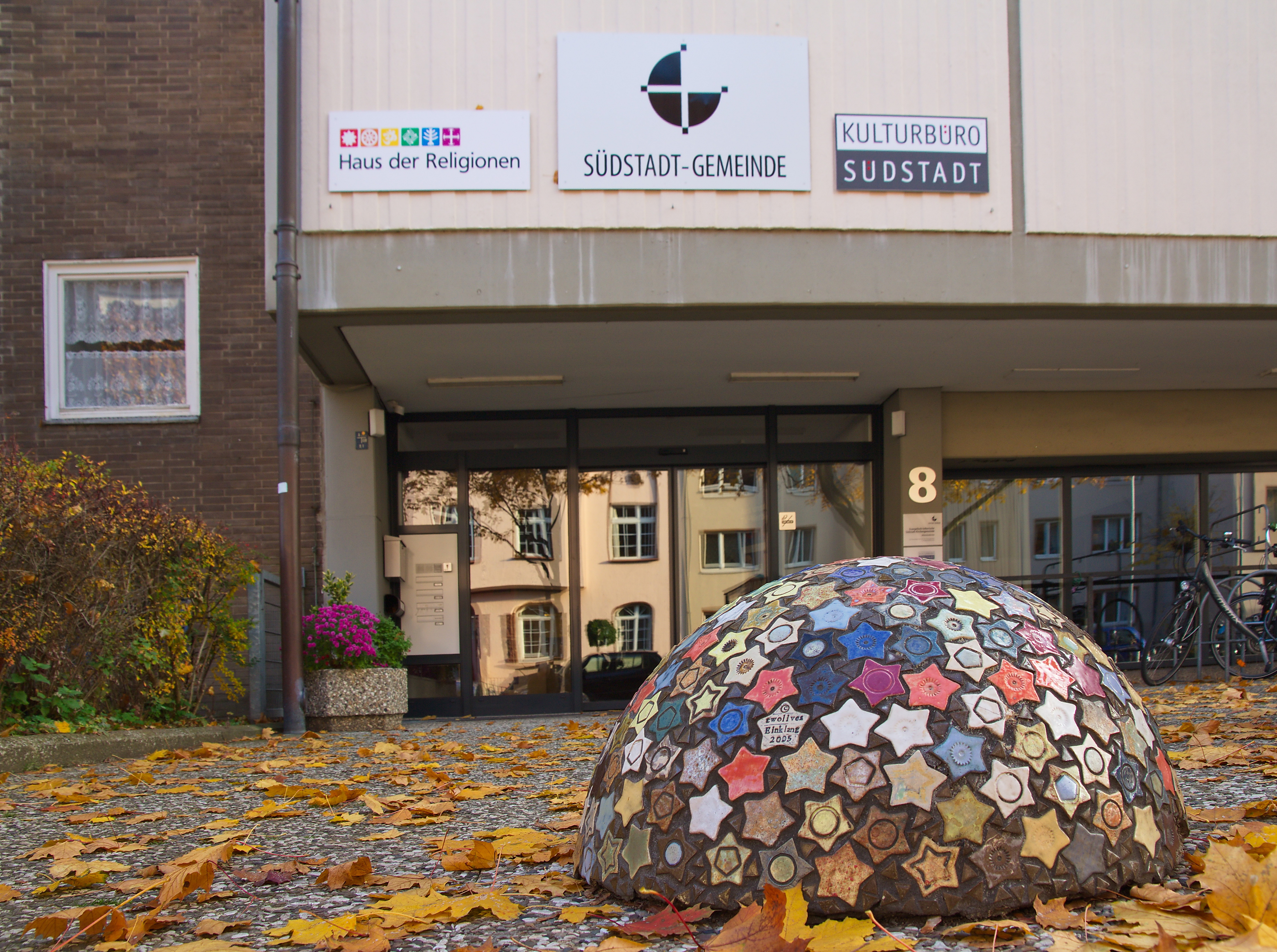 Das "Haus der Religionen Hannover" hat seit dem Deutschen Evangelischen Kirchentag 2005 seinen Ort in den Räumen der Athanasiusgemeinde (Hannover) in Niedersachsen, Deutschland